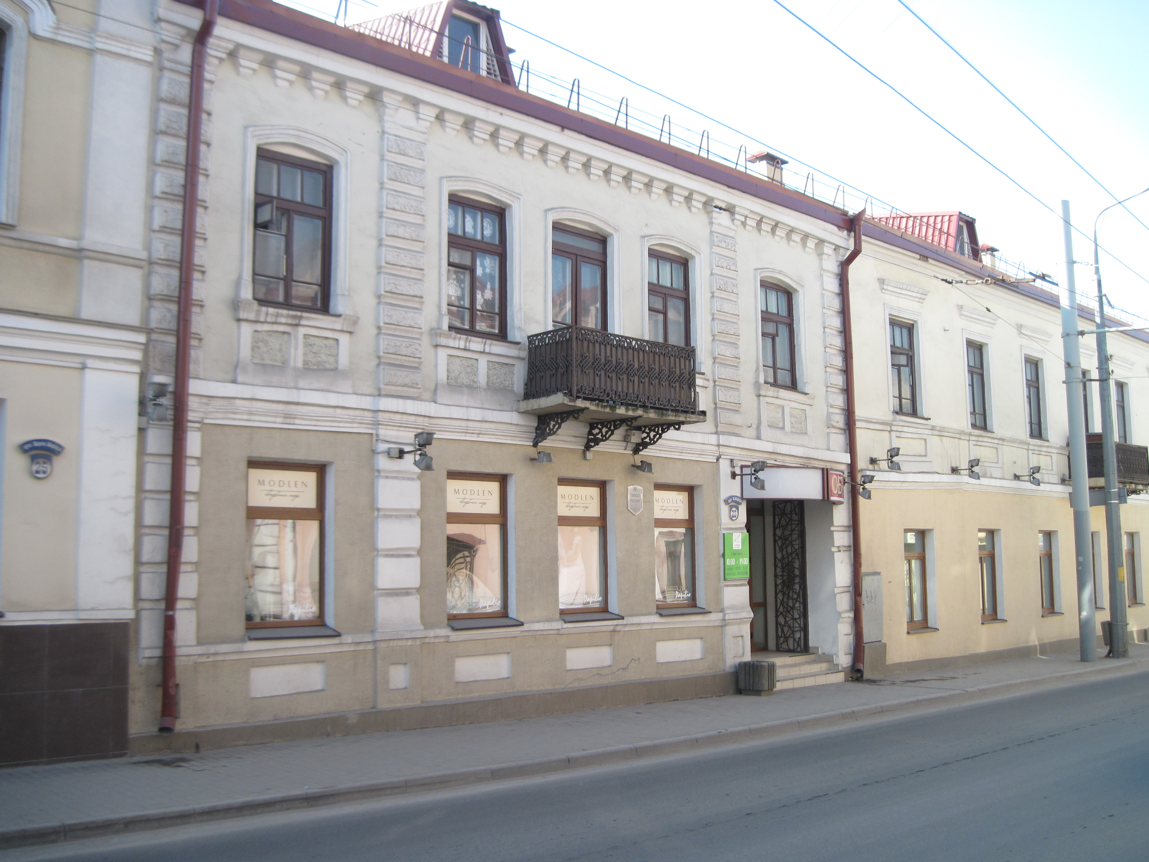 Забудова гістарычнага цэнтра Гродна. Вуліца Маркса, 23.